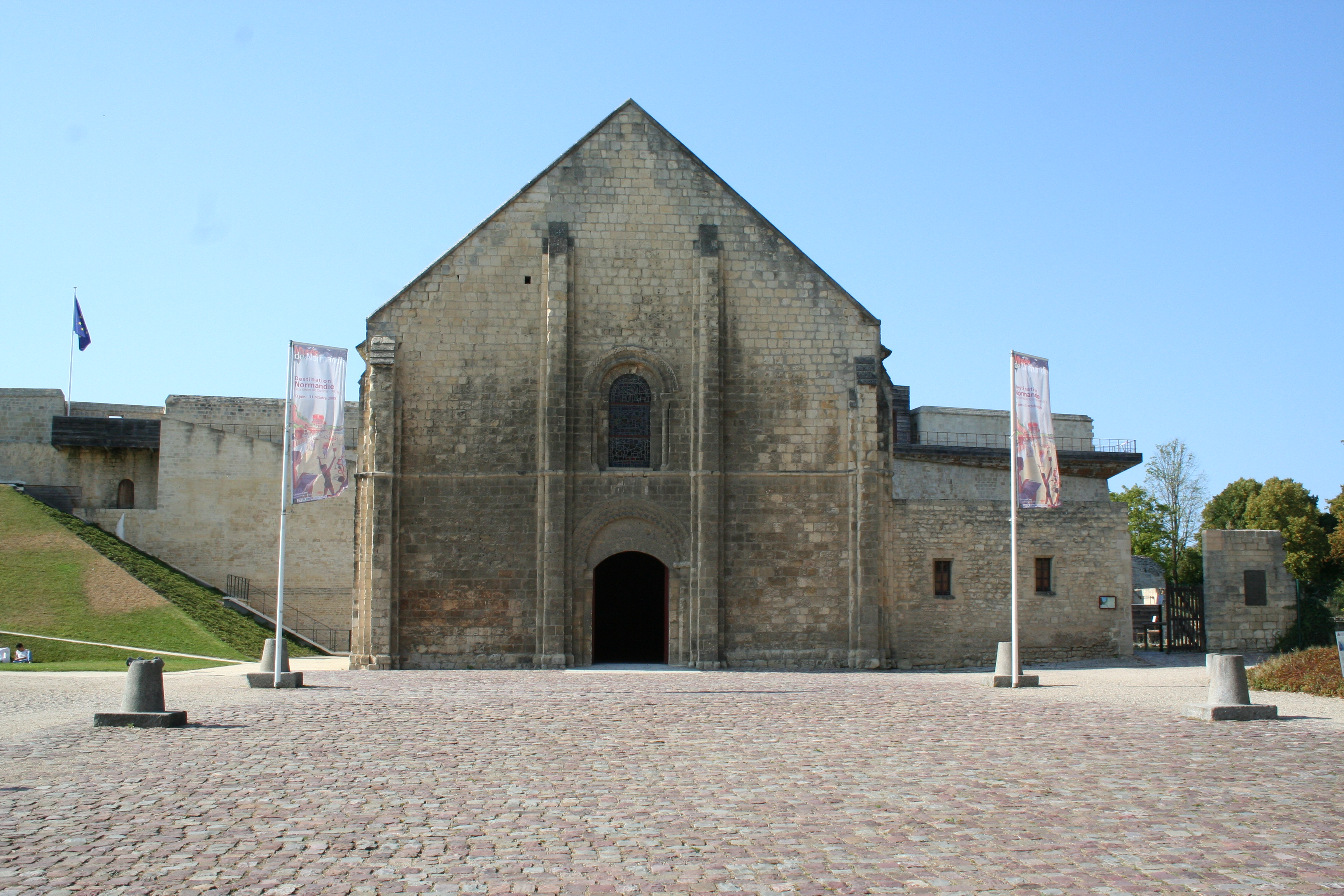 Façade principale de l'échiquier de Normandie, château de Caen, Normandie, France